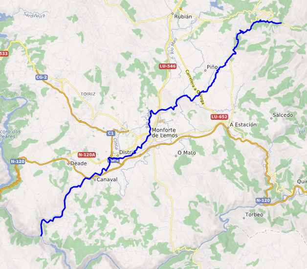 carte réalisée sur umap This map may be incomplete, and may contain errors. Don't rely solely on it for navigation.